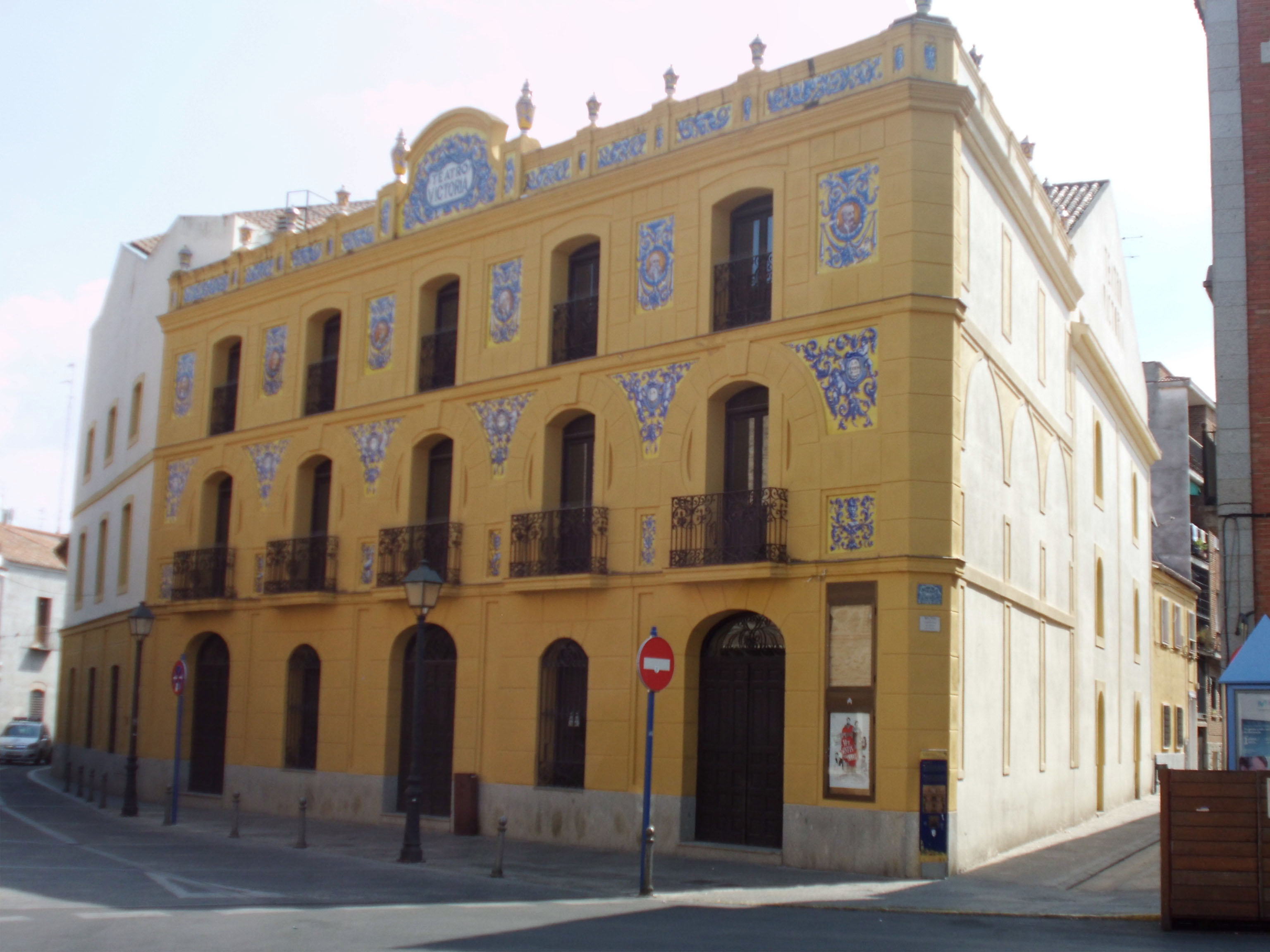 Teatro Victoria en Talavera de la Reina